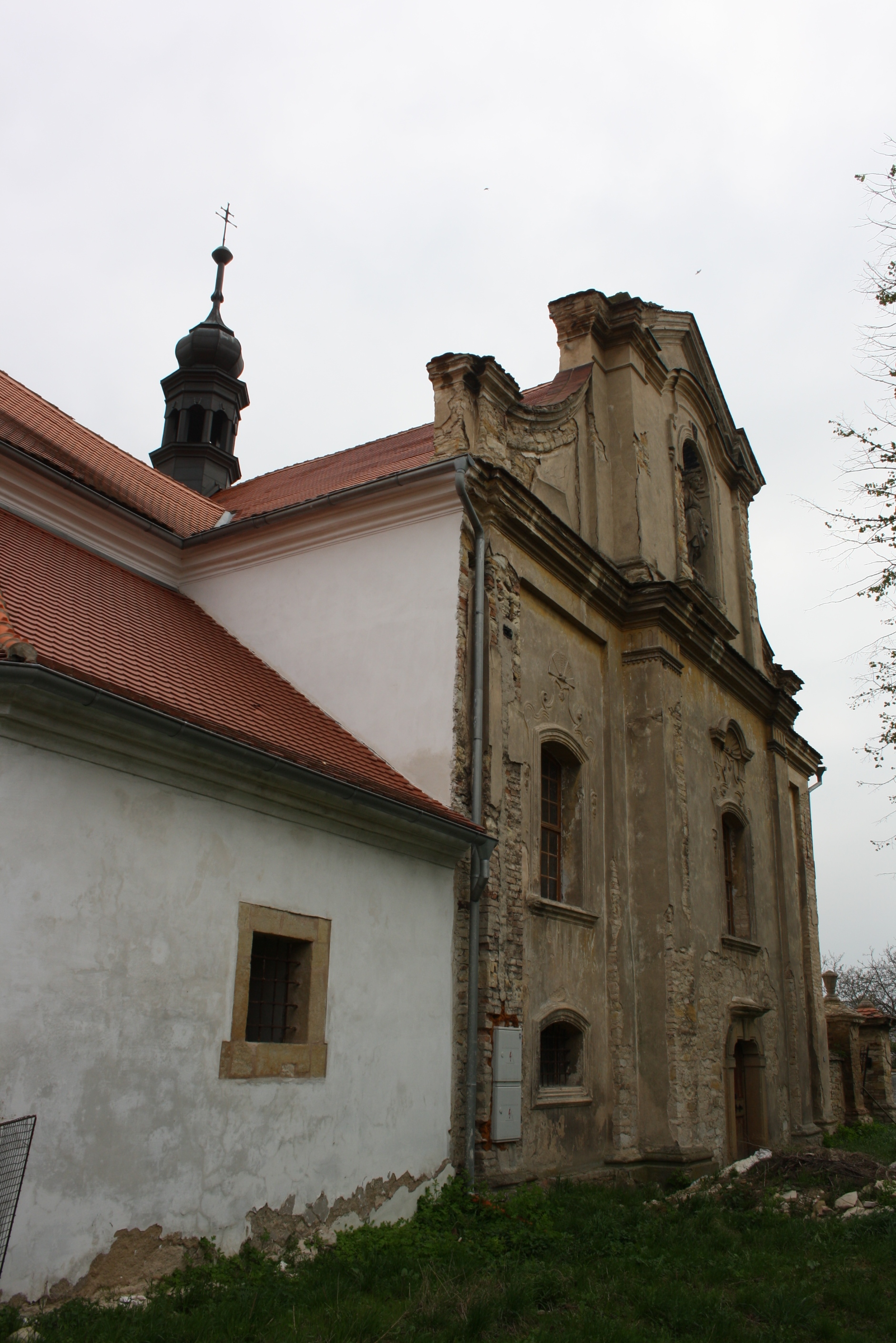 Kostel Narození Panny Marie v Hrušovanech, části Polep.